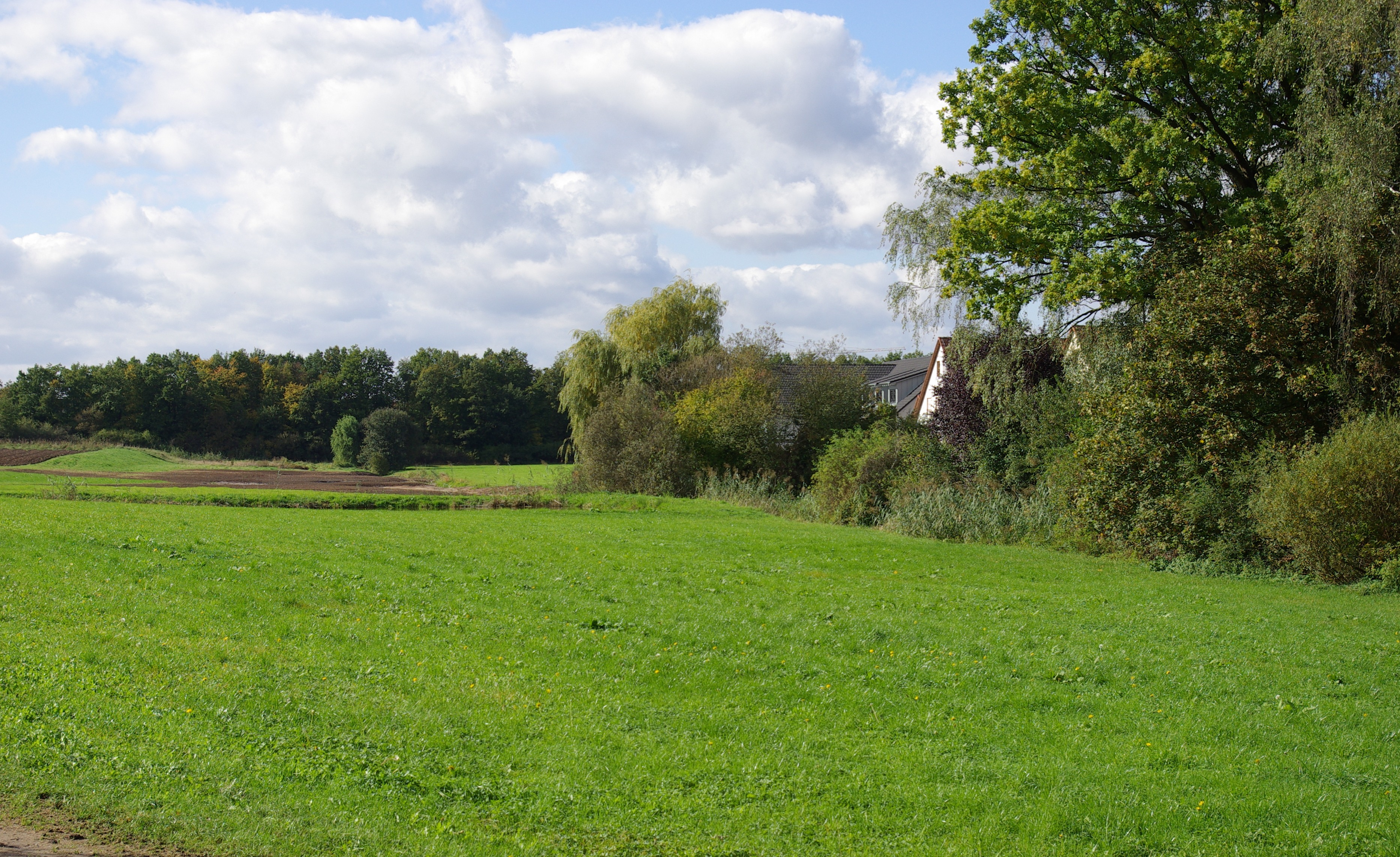 Der Bimbach beim Erlanger Stadtteil Häusling